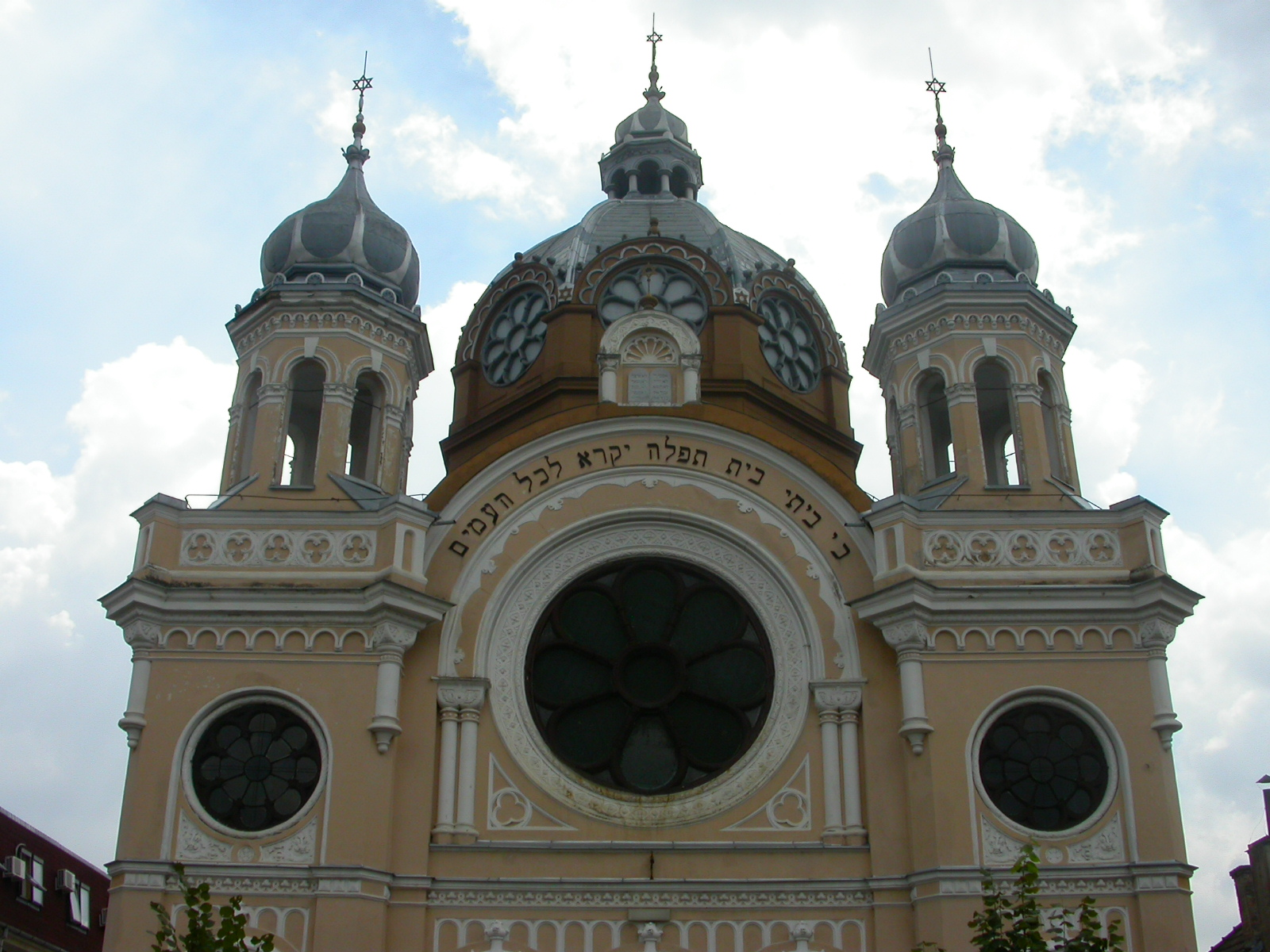 Sinagogă, 1899-1900